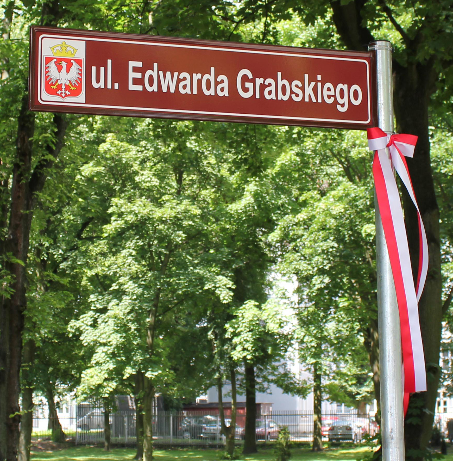 Gniezno, ulica Edwarda Grabskiego